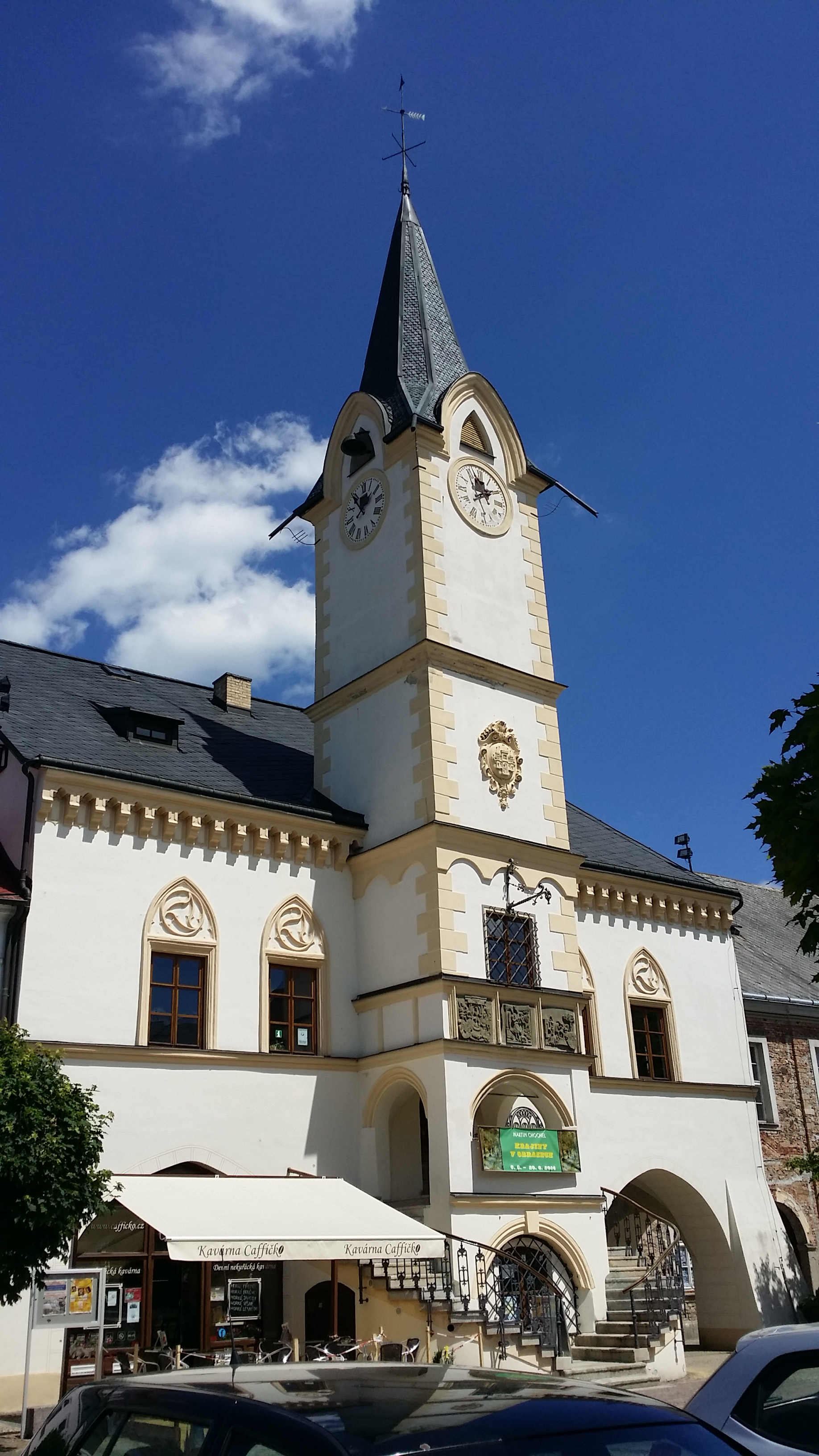 Radnice, Staré náměstí 46, Ostrov (okres Karlovy Vary).